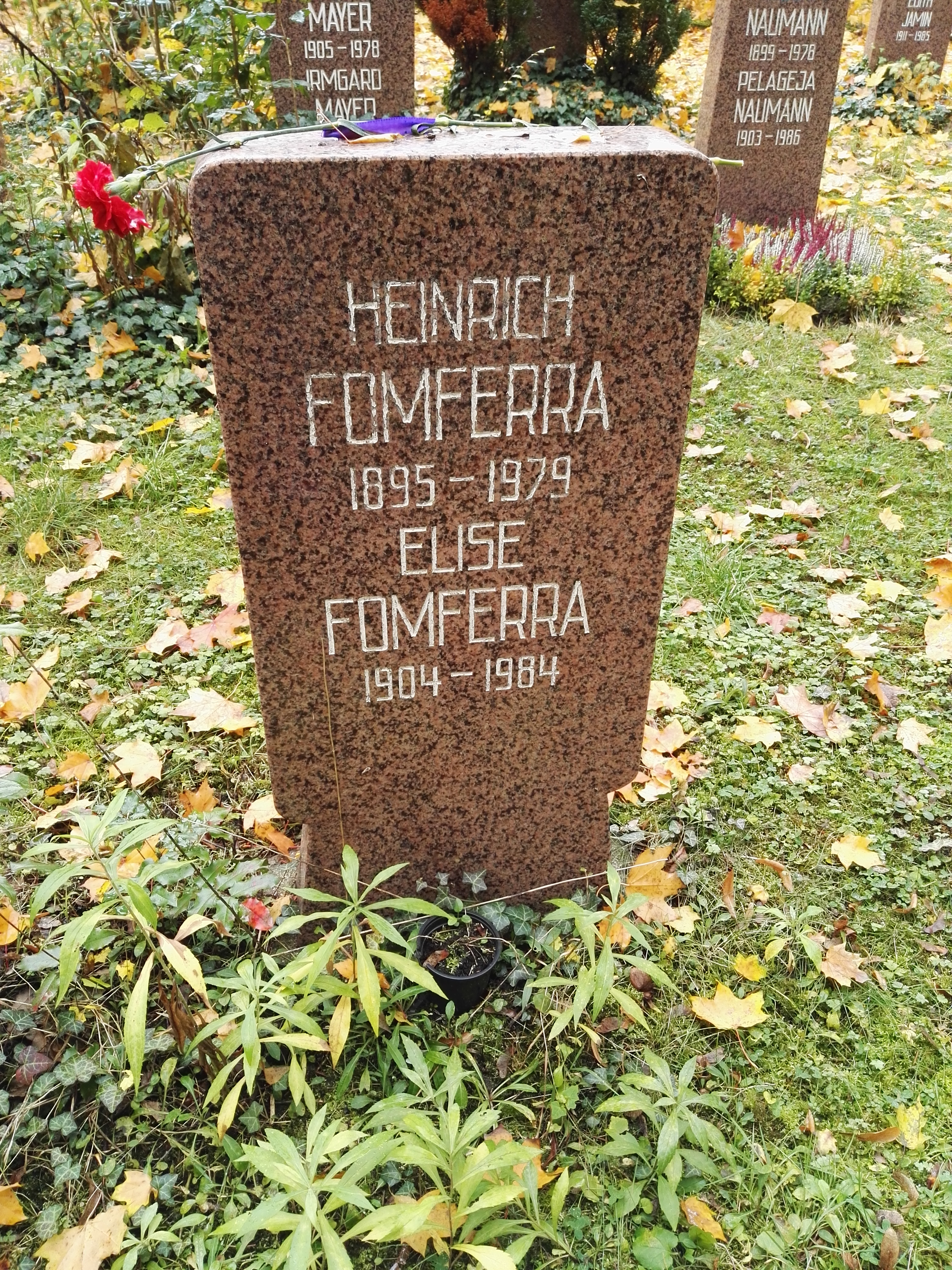 Grab von Heinrich Fomferra und Elise Fomferra auf dem Sozialistenfriedhof des Zentralfriedhofs Friedrichsfelde